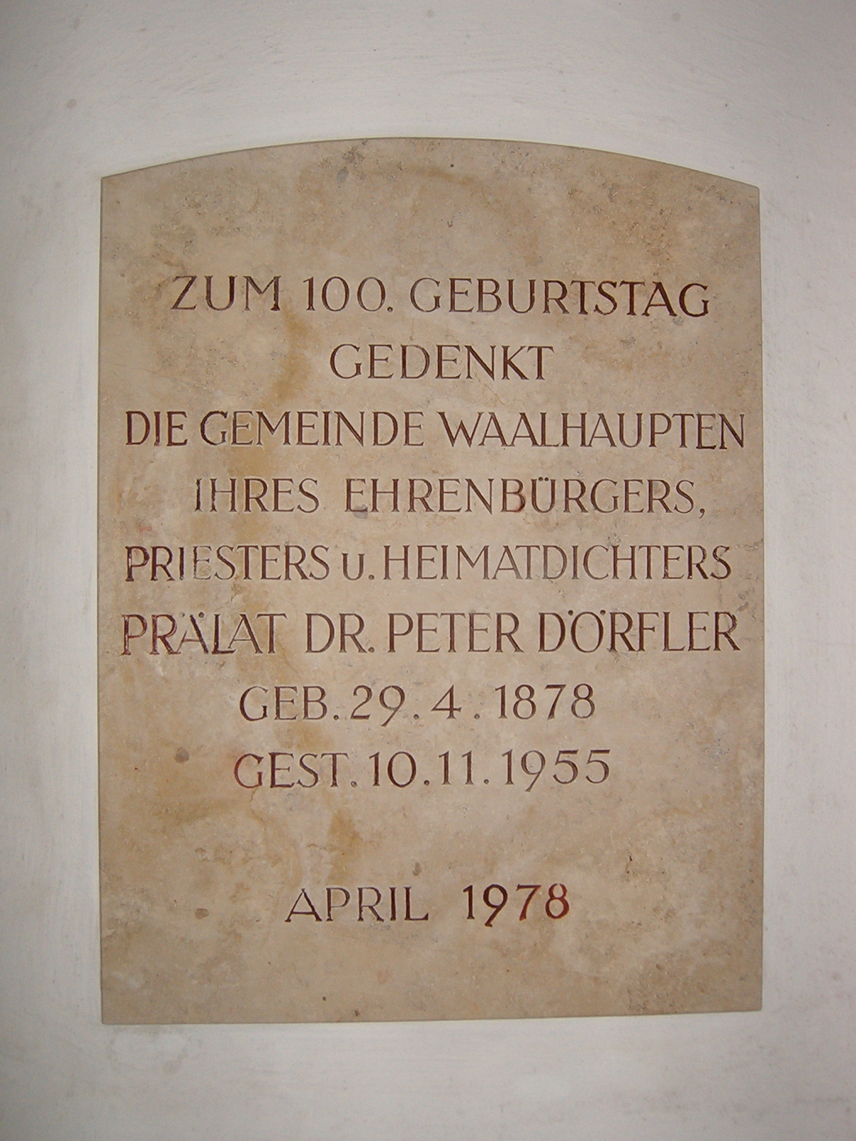 Gedenktafel zum 100. Geburtstag von Peter Dörfler in der Kirche St. Michael in Waalhaupten